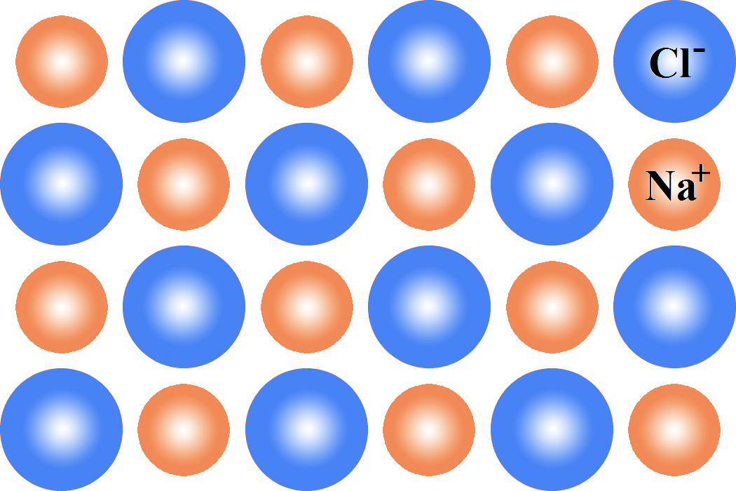 Структура кристалла NaCl